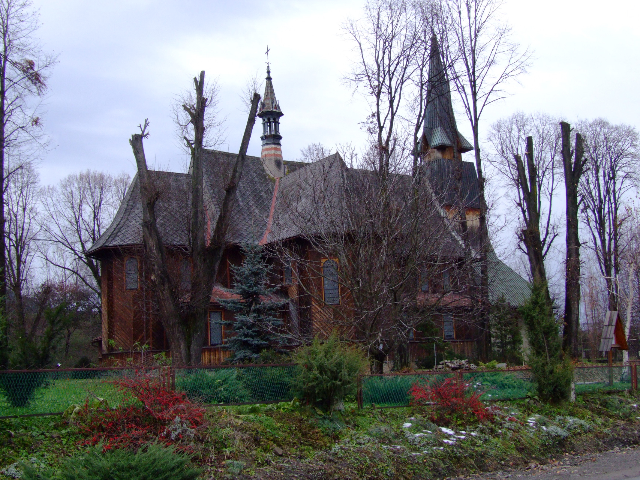 Kościół w Jurkowie (powiat limanowski)